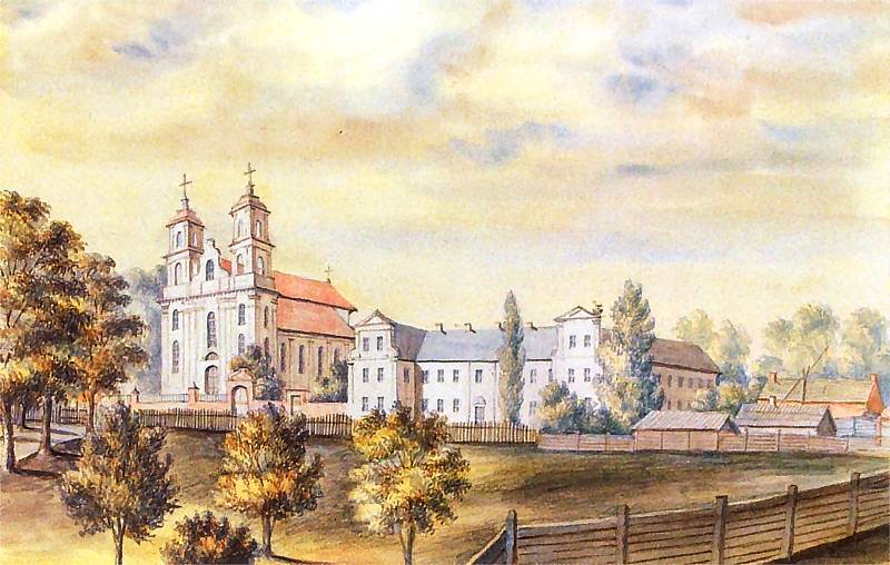 Беларуская (тарашкевіца): Сьмілавічы (Śmiłavičy). Касьцёл Сьвятога Вінцэнта і кляштар місіянэраў